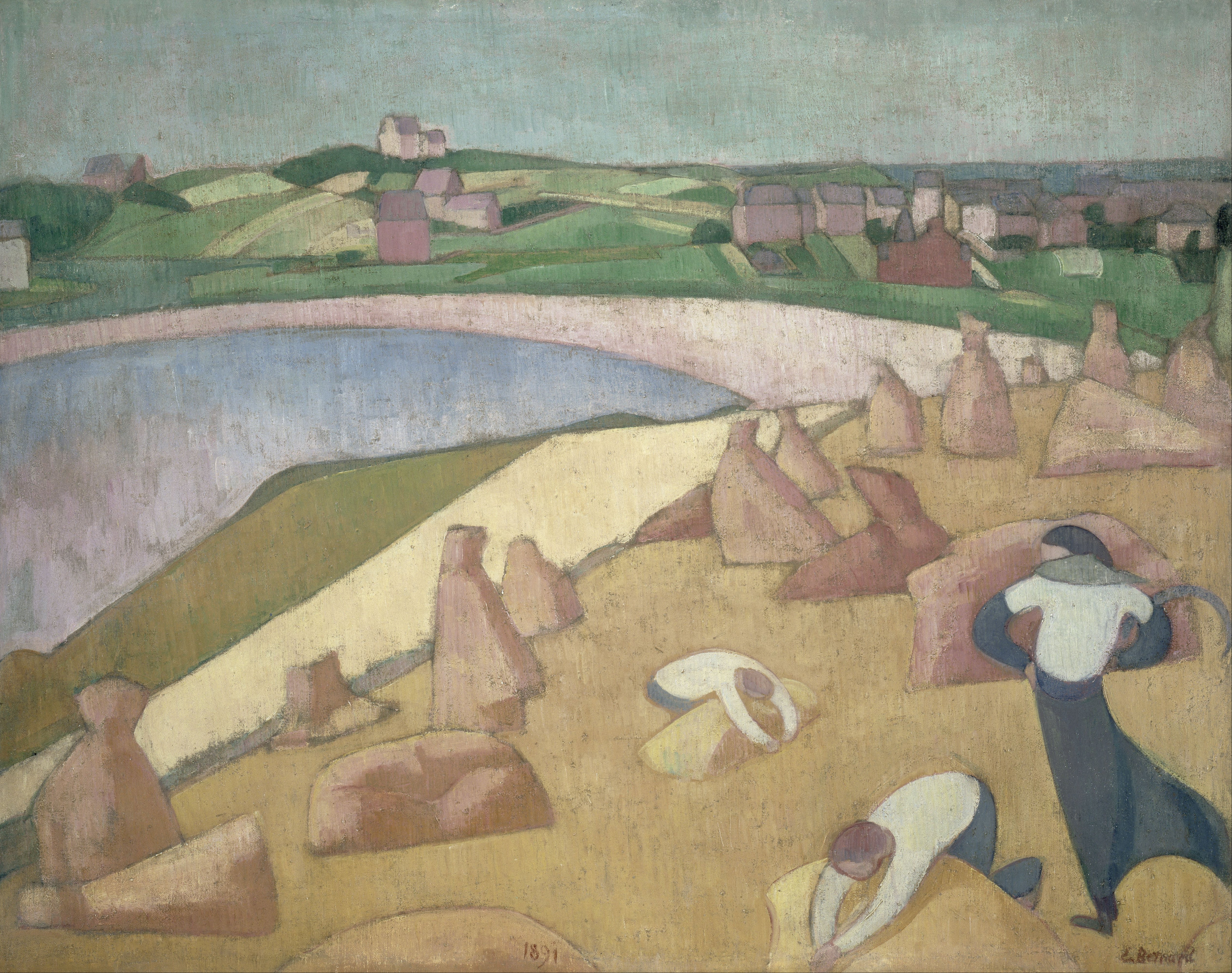 See Details (Détails – Particulari – Detalles)